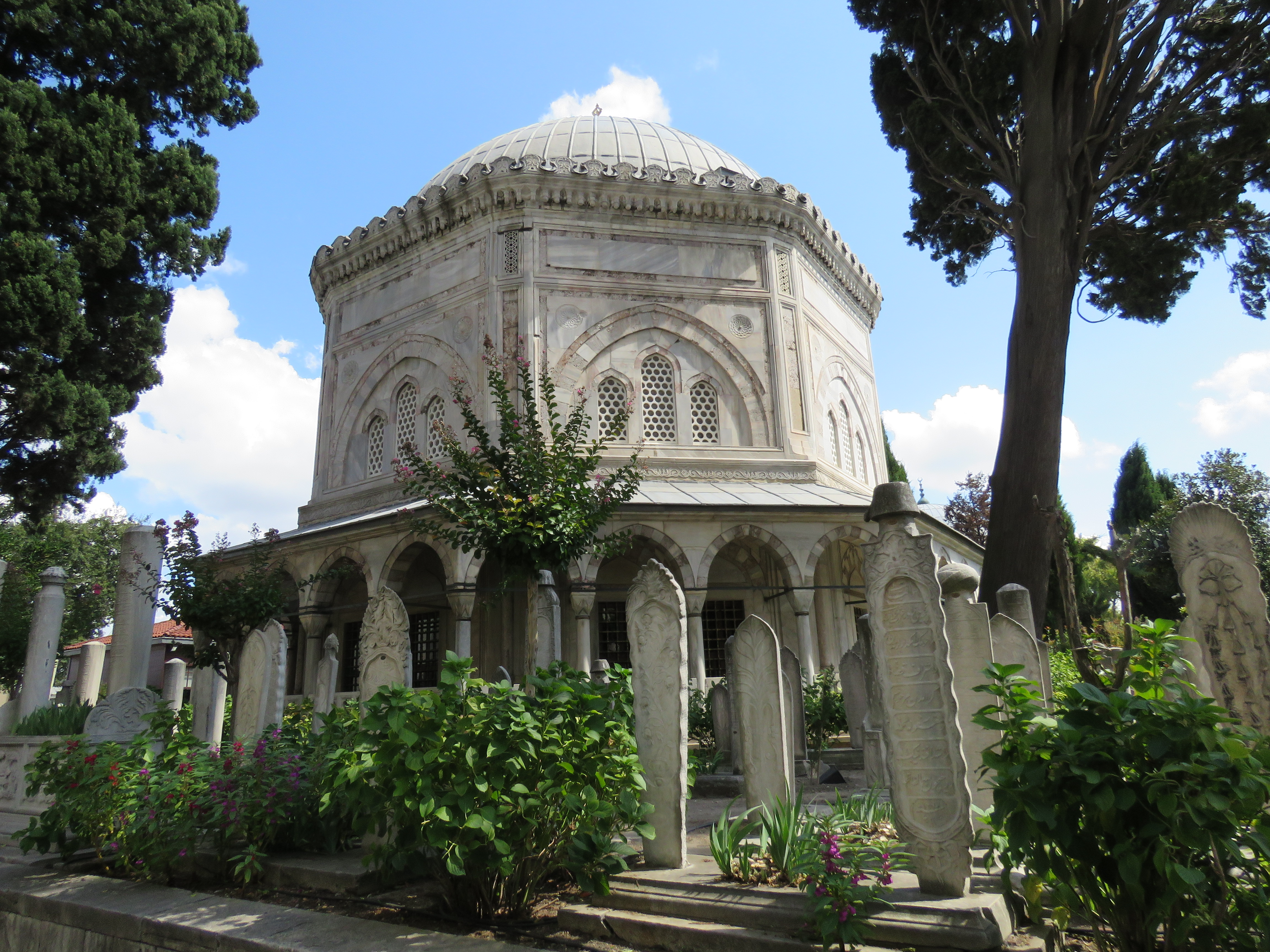 Grobnica (turbe) osmanskega sultana Sulejmana I. ob mošeji Sulejmanija, Istanbul, Turčija